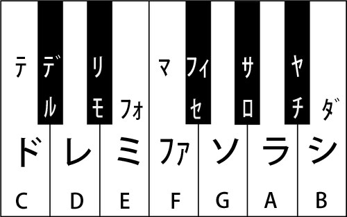 ドレミ式固定音名唱を説明するための鍵盤図。佐藤吉五郎「私はなぜ固定ドを主張するか－ドレミ式固定音名唱－」(『音楽教育研究』No50、1970年6月号、音楽之友社、pp72-84)の五線譜と説明にもとづいて、独自に作成。